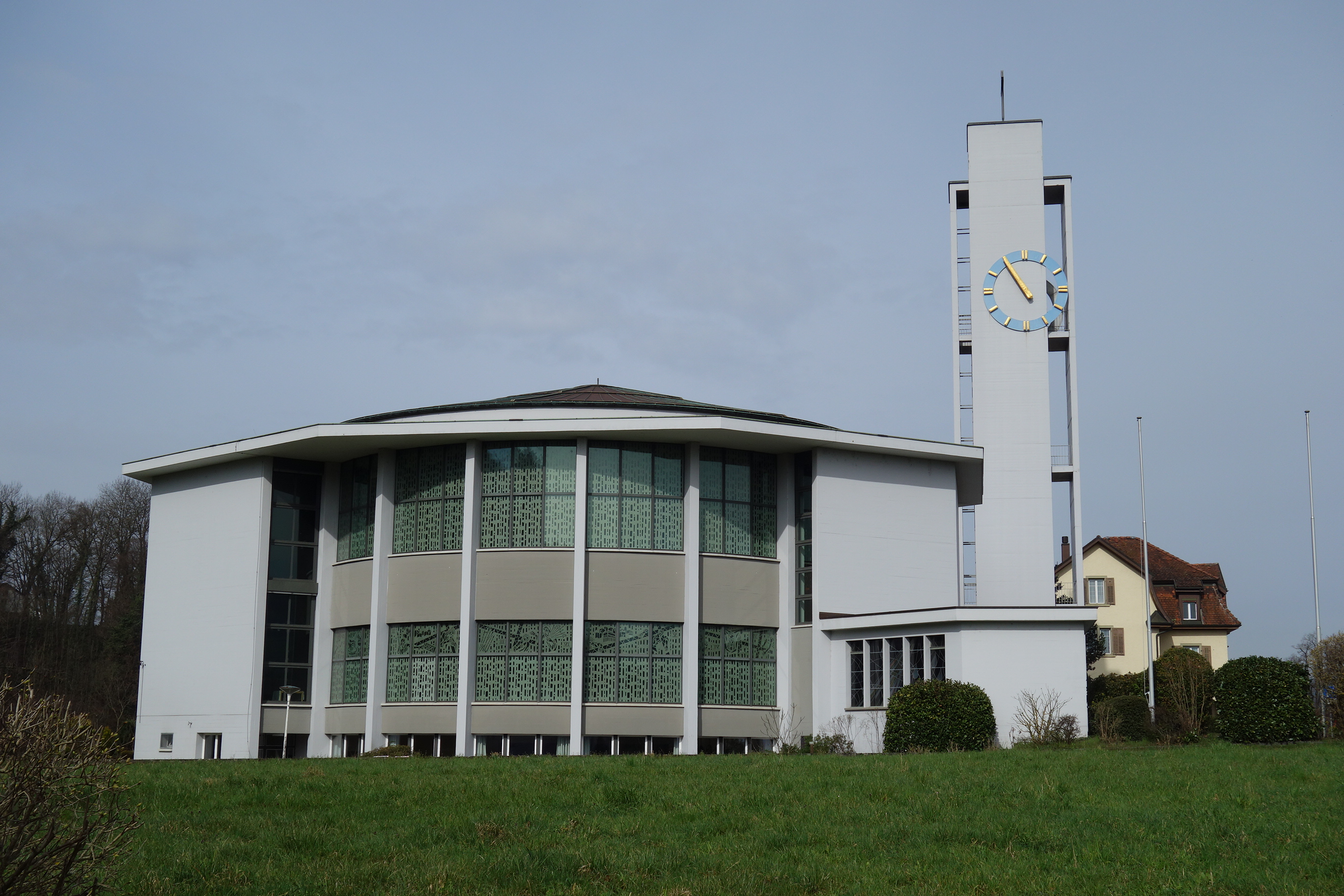 Katholische Kirche Turgi AG, Schweiz